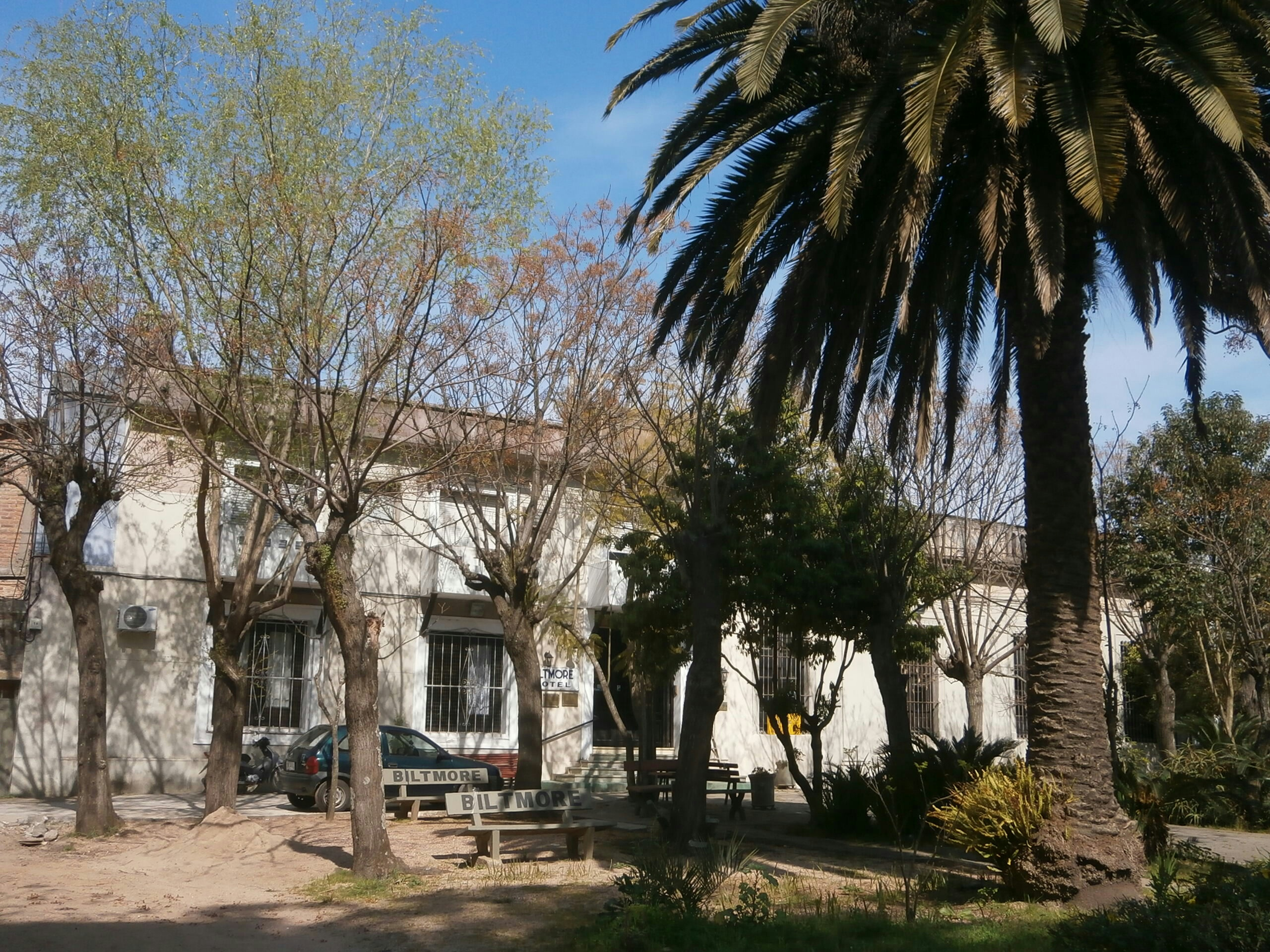 Hotel Biltmore. Ubicada en el departamento de Canelones